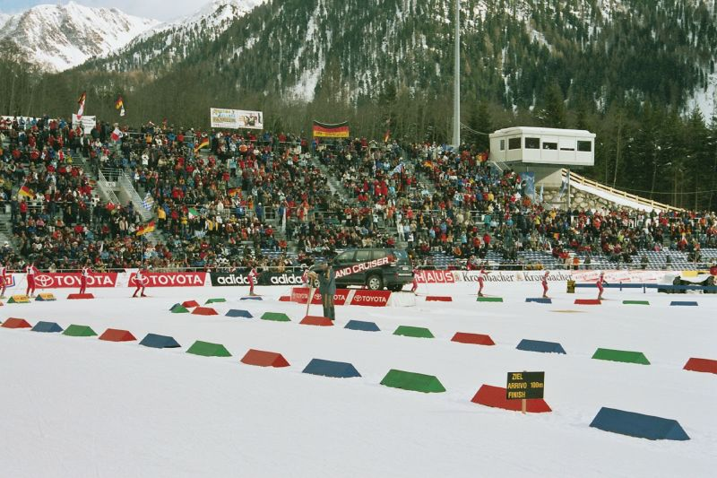 Biathlon Stadion, Antholz, Antaselva, Südtirol, Zuschauertribüne